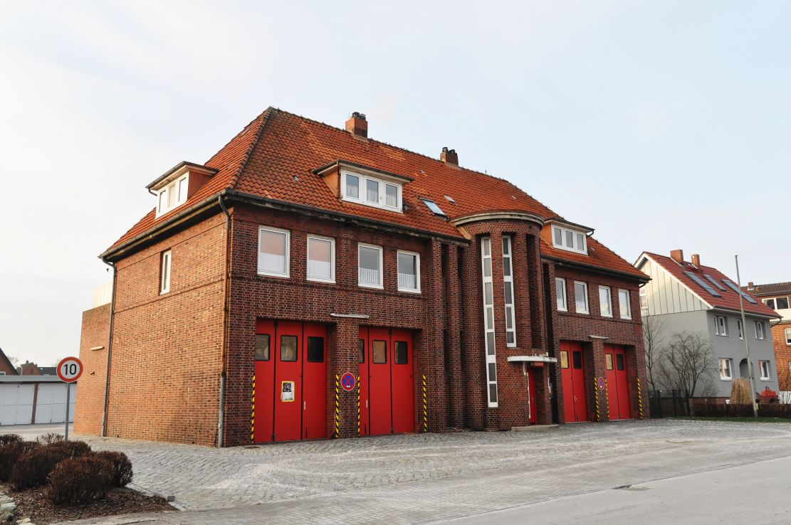 Cuxhaven 2014